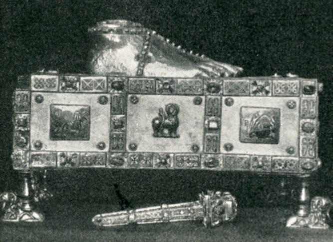 Andreas-Tragaltar (Egbertschrein)